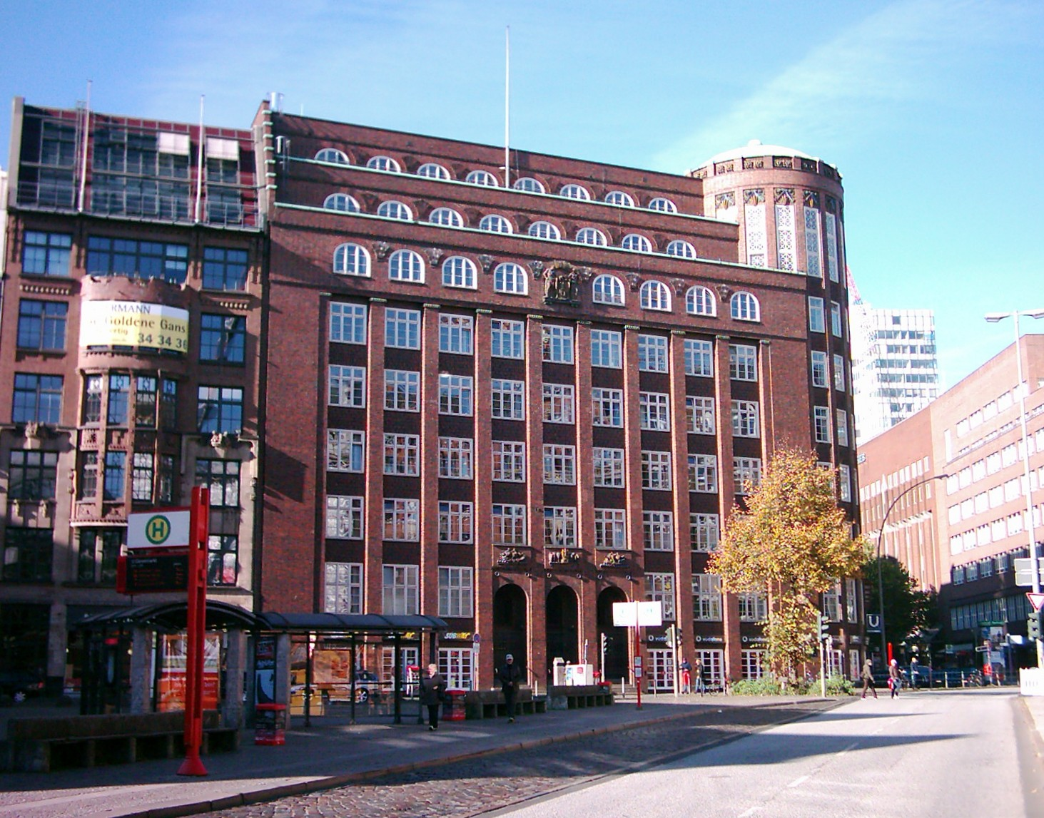 Die Finanzbehörde Hamburg am Gänsemarkt. Rechts im Bild die Linde am Gänsemarkt. This is a photograph of an architectural monument.